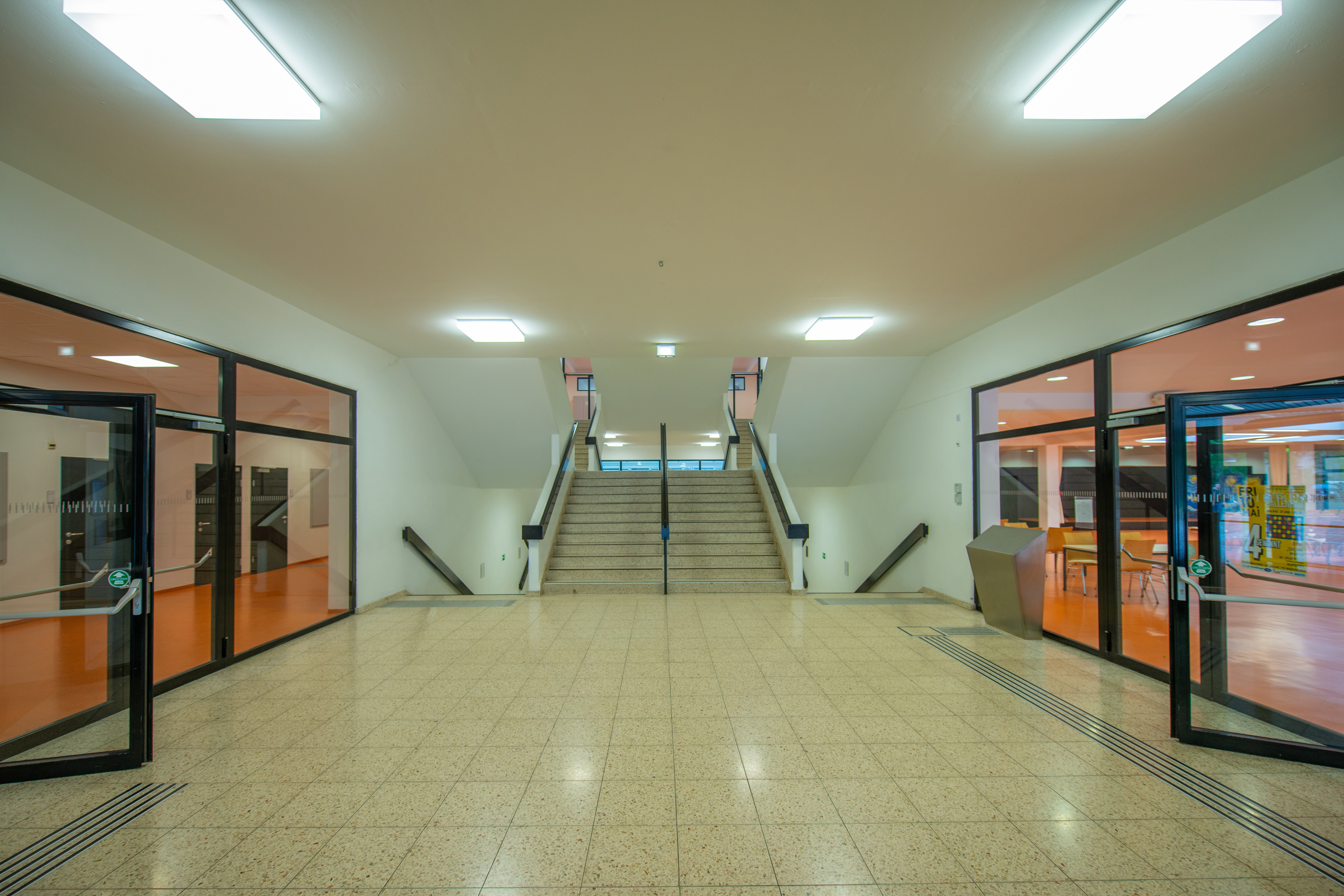 Das Bundesgymnasium Blumenstraße (BG Blumenstraße) ist ein österreichisches Bundesgymnasium in der Vorarlberger Landeshauptstadt Bregenz.